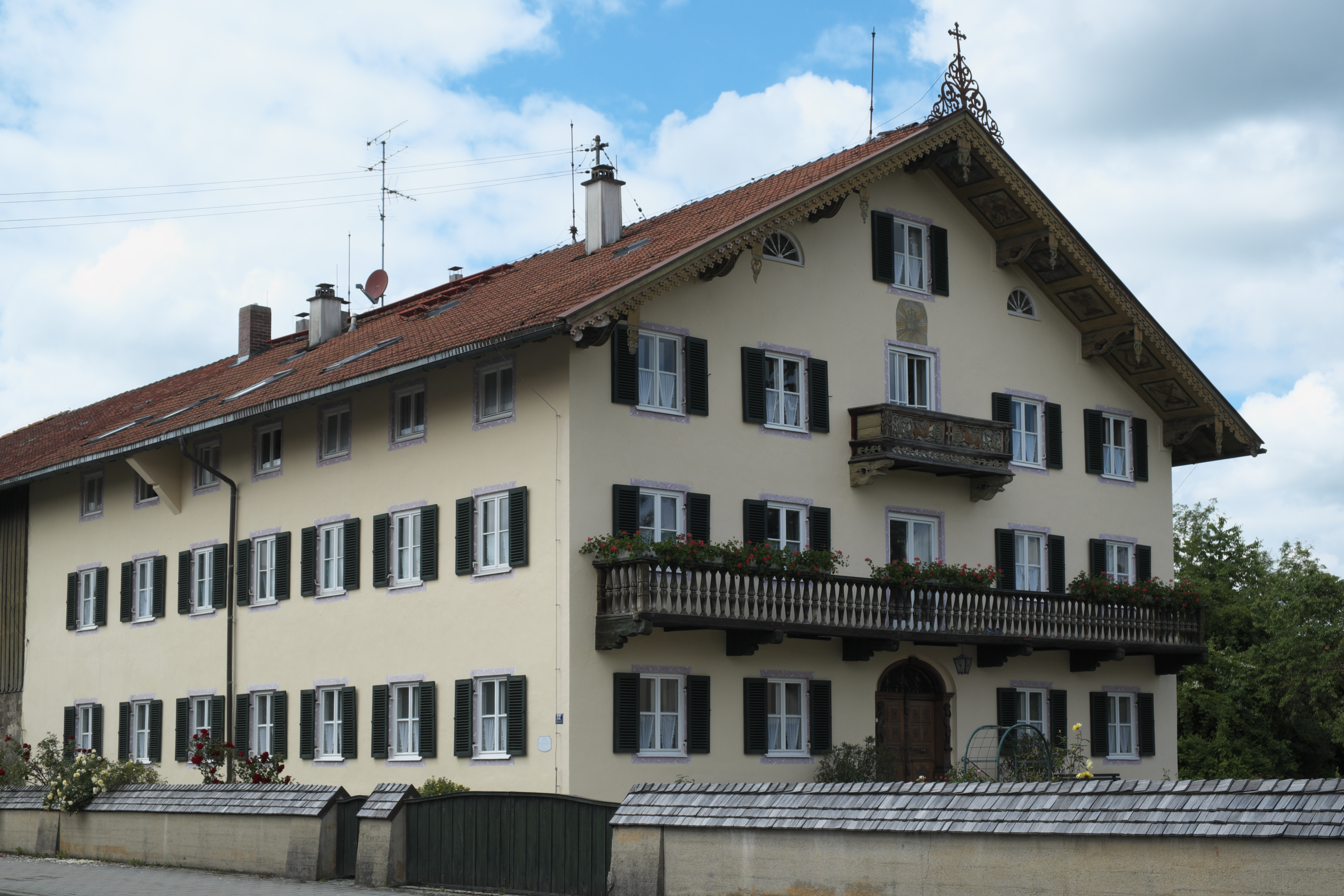 Bauernhaus Beim Lindmaier in Sauerlach im Landkreis München (Bayern/Deutschland)